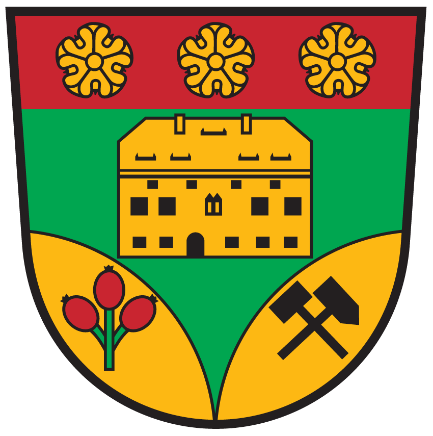 Wappen von Großkirchheim